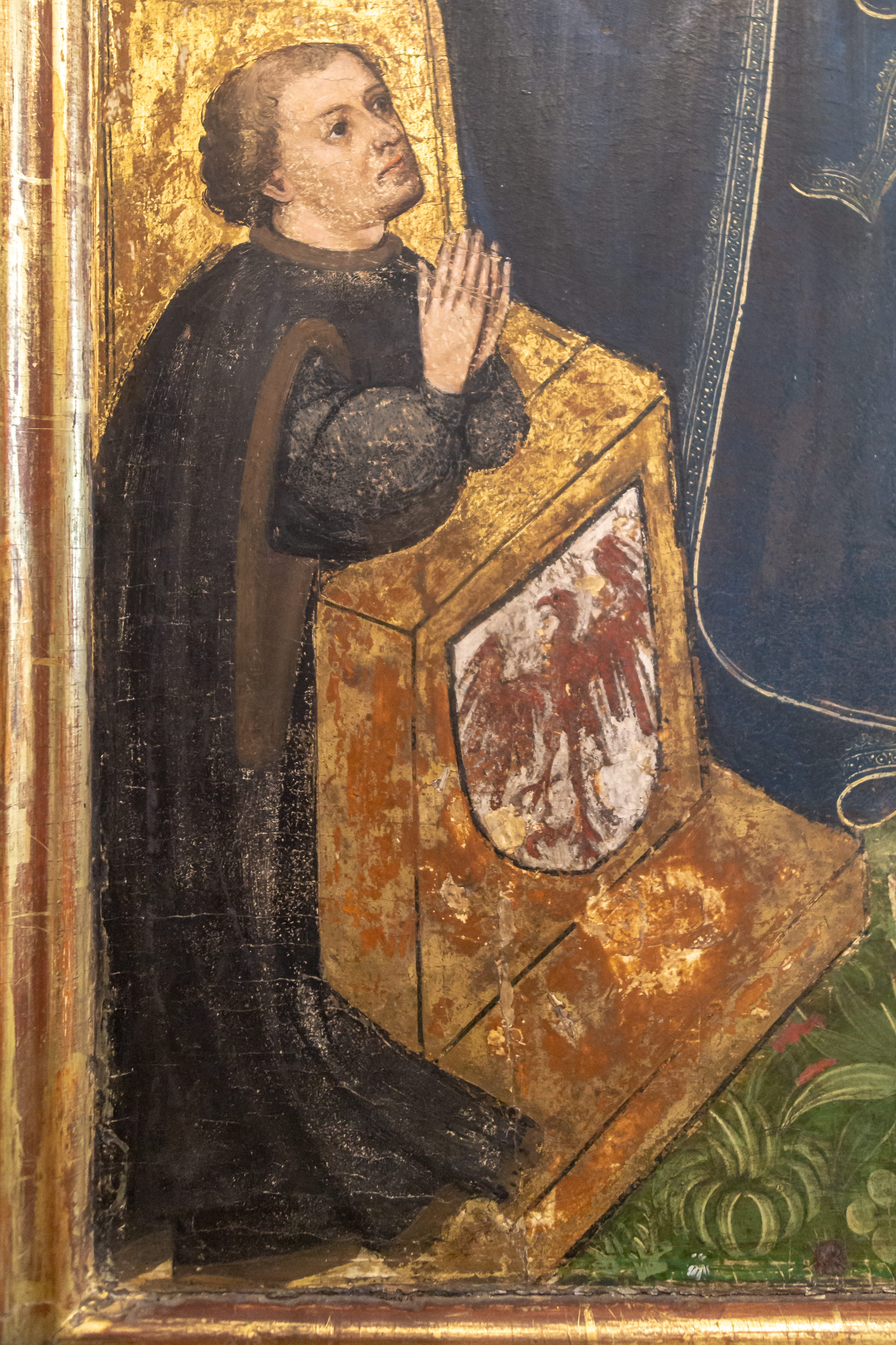 Stifter Friedrich I. von Brandenburg